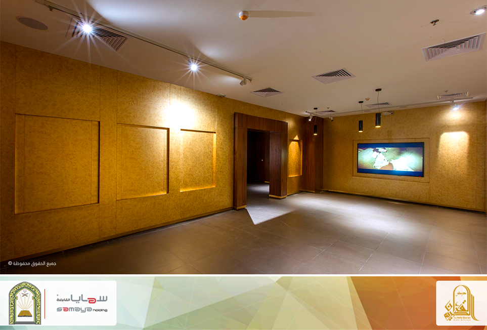 صورة من قاعة الجهود الحديثة للعناية بالقرآن الكريم " مجمع الملك فهد لطباعة القرآن"